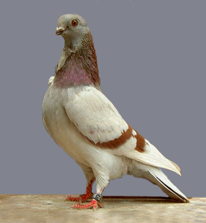 Valencian Figurita (Mealie)